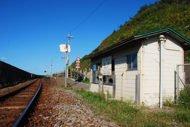 五能線広戸駅